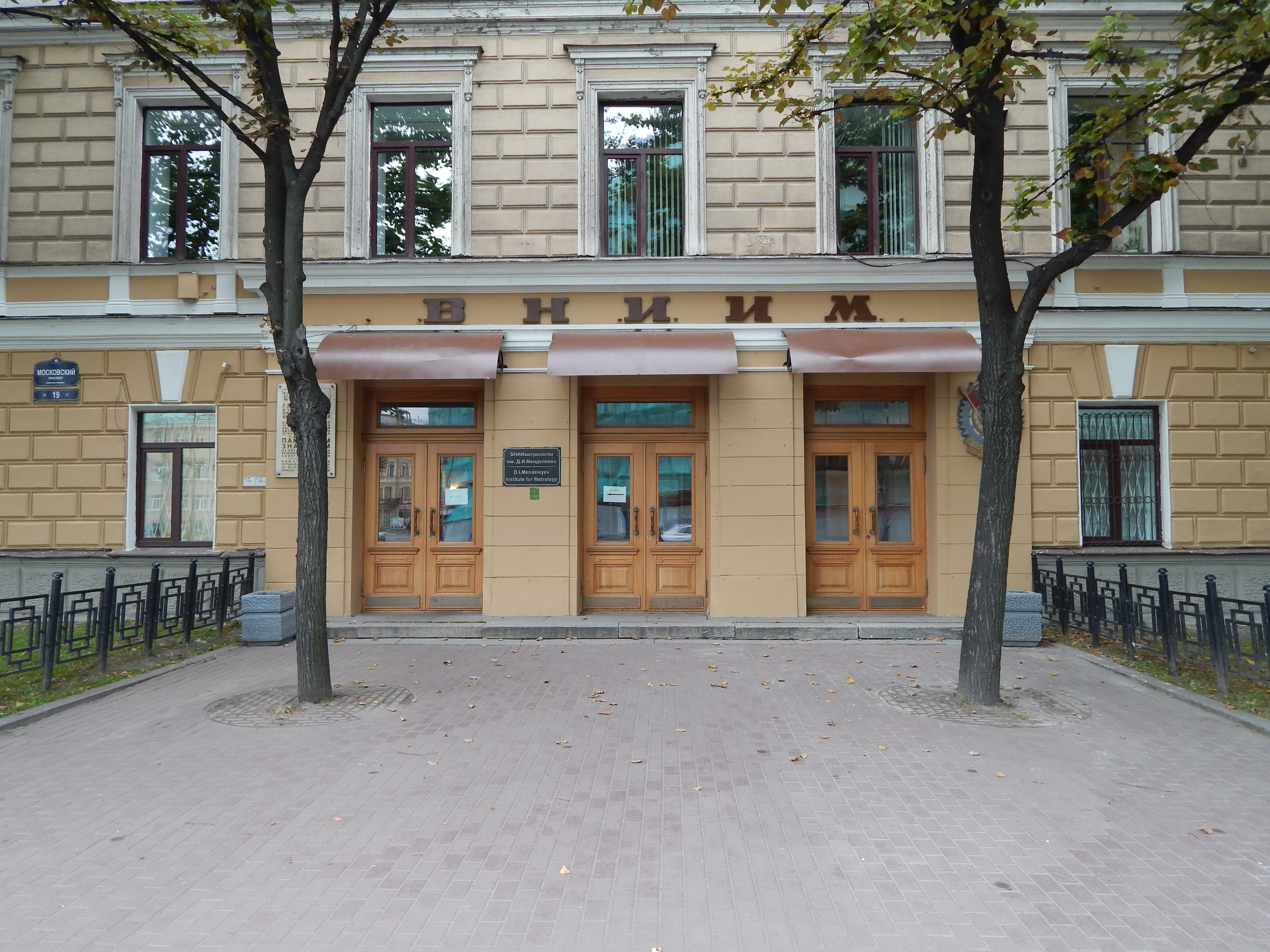 ВНИИ Метрологии (Санкт-Петербург, Московский проспект, 19)